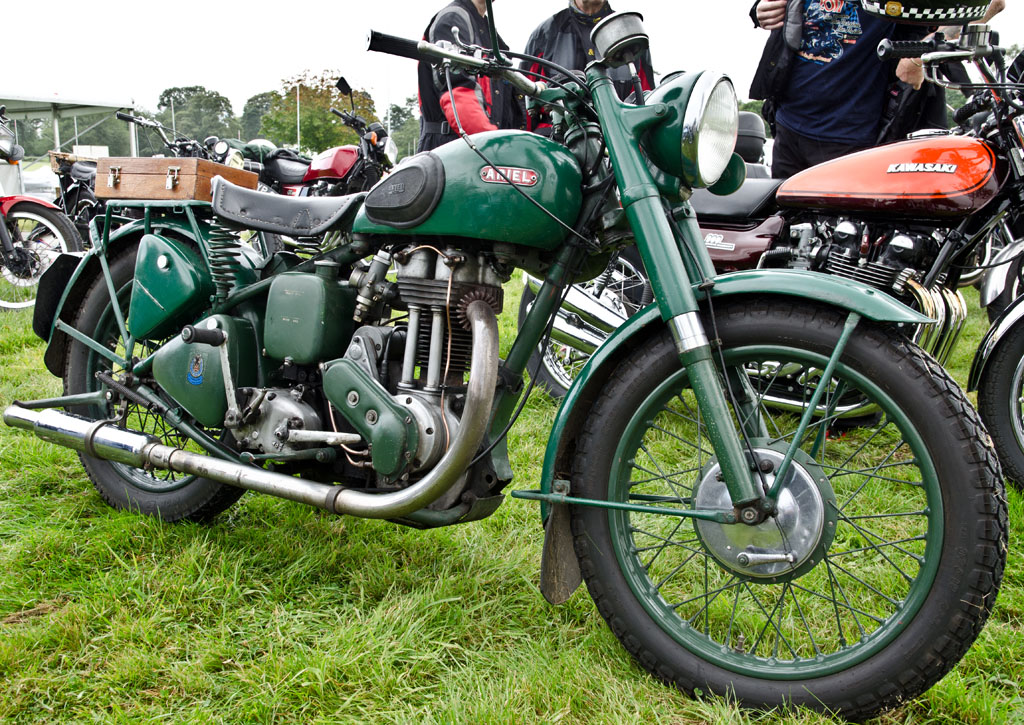 1946 Ariel W-NG